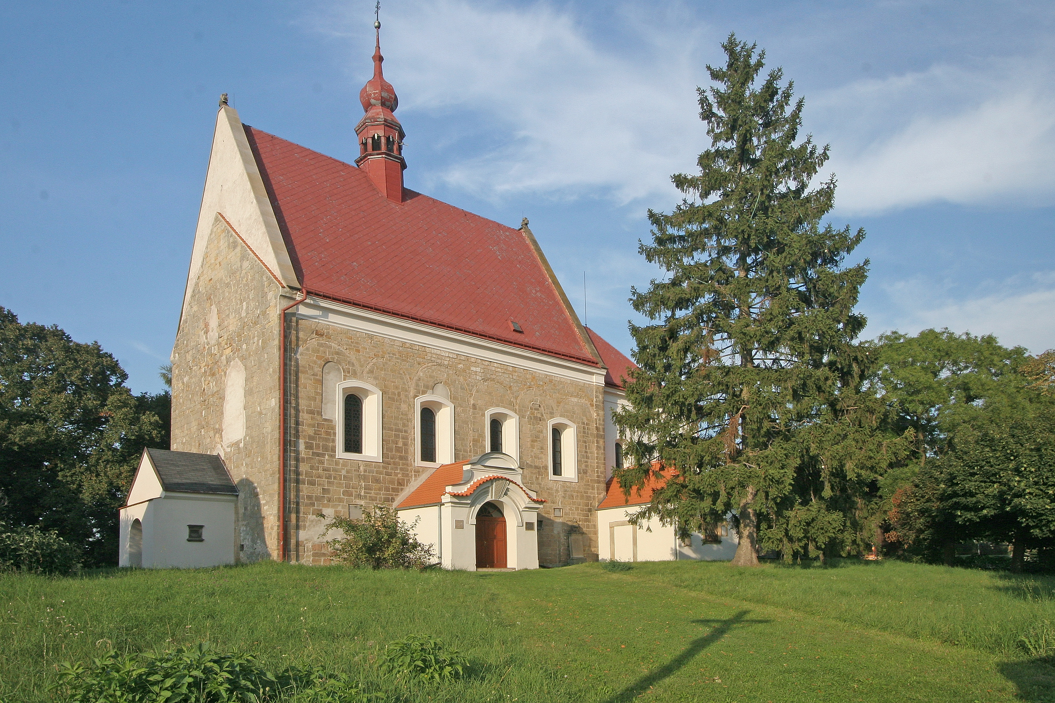 Kostel Nanebevzetí P. Marie (Libčany), Libčany